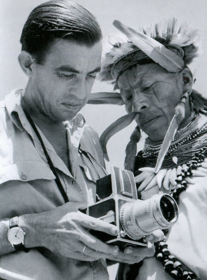 Rolf Blomberg, dokumentärfilmare och författare